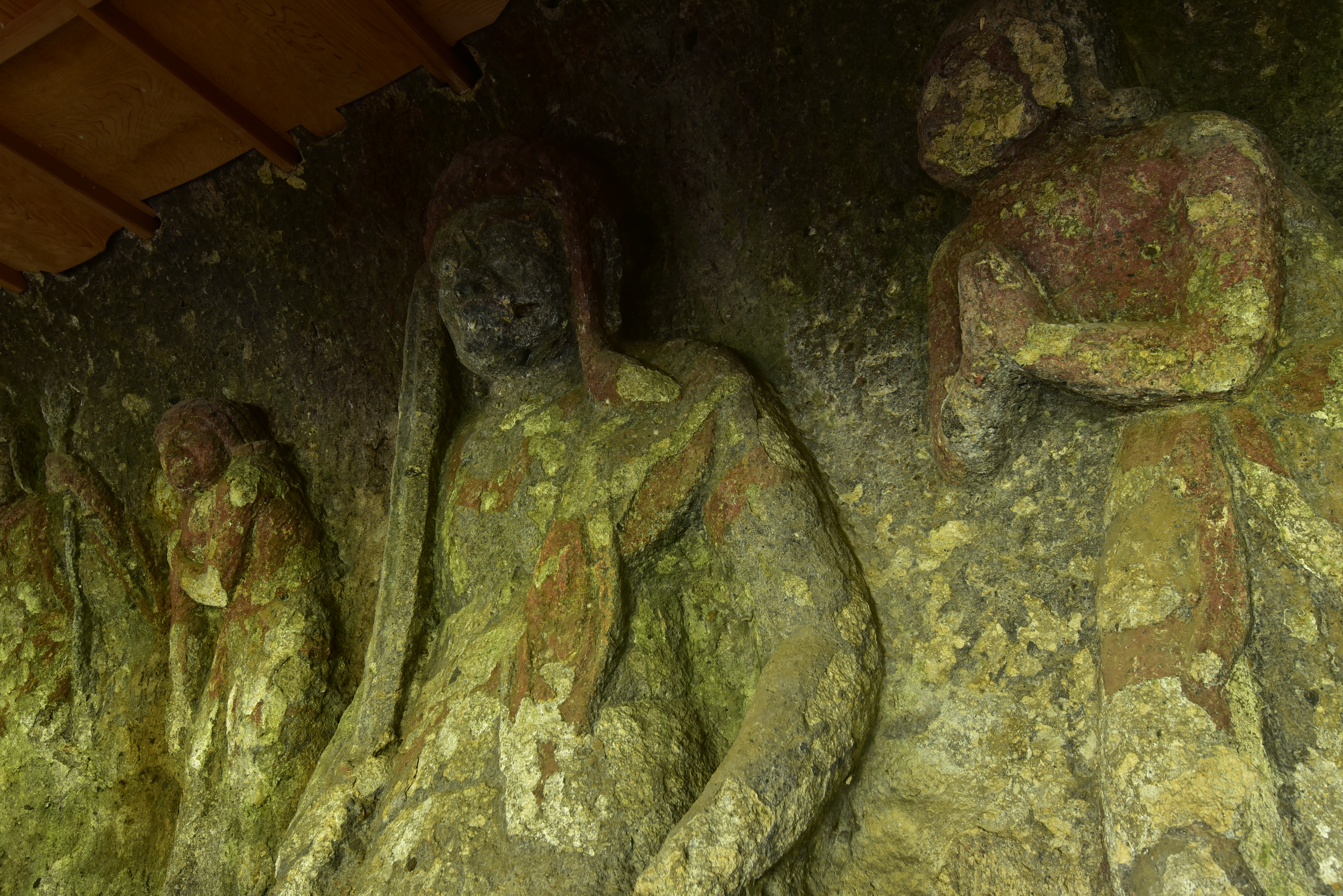 磨崖仏に向かって右から、多聞天、矜羯羅童子、不動明王、制吒迦童子、増長天の五体が半肉彫りされている。